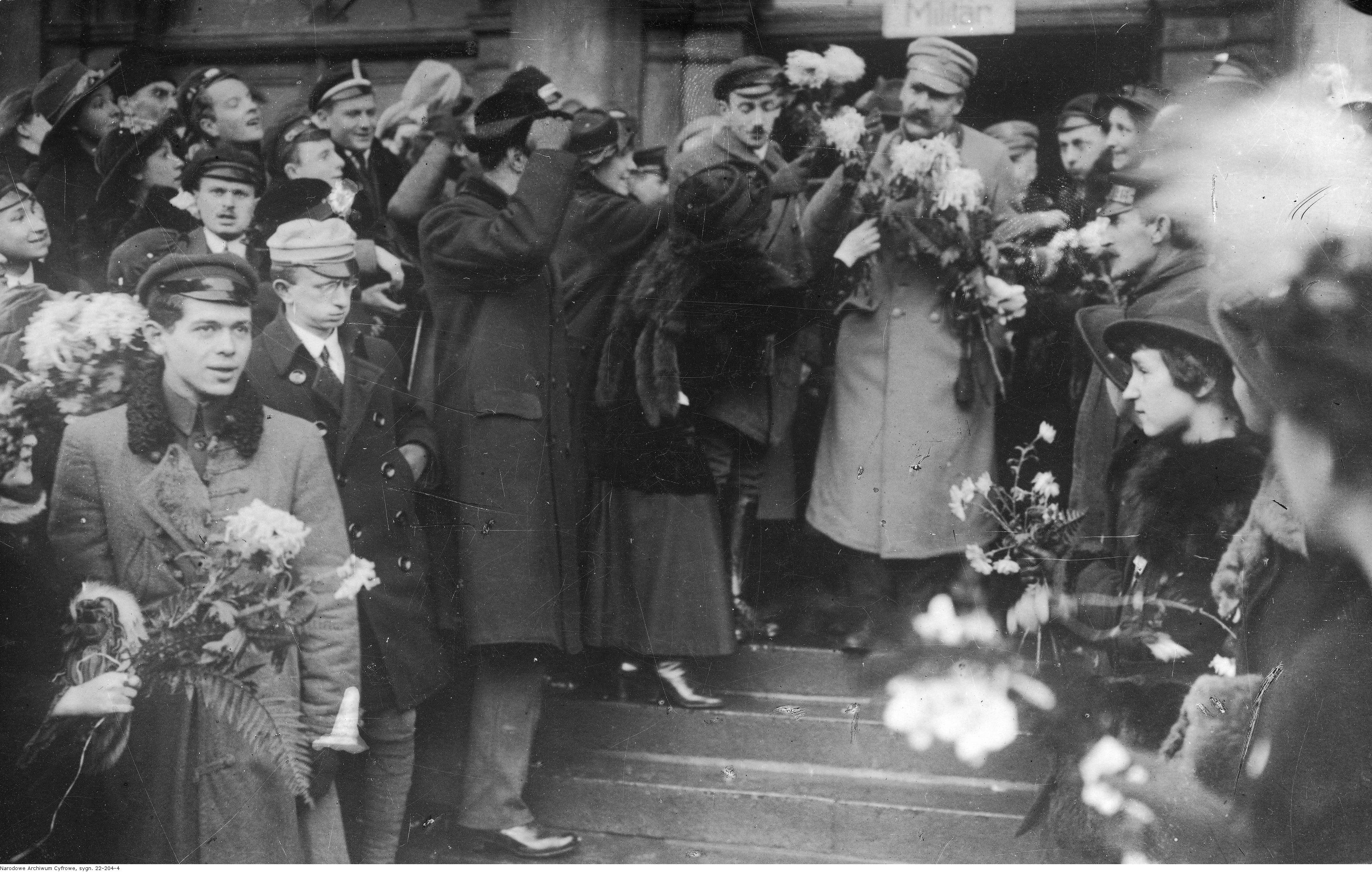 Powitanie Józefa Piłsudskiego. Widoczny m.in. Wacław Jędrzejewicz (na lewo od J. Piłsudskiego).